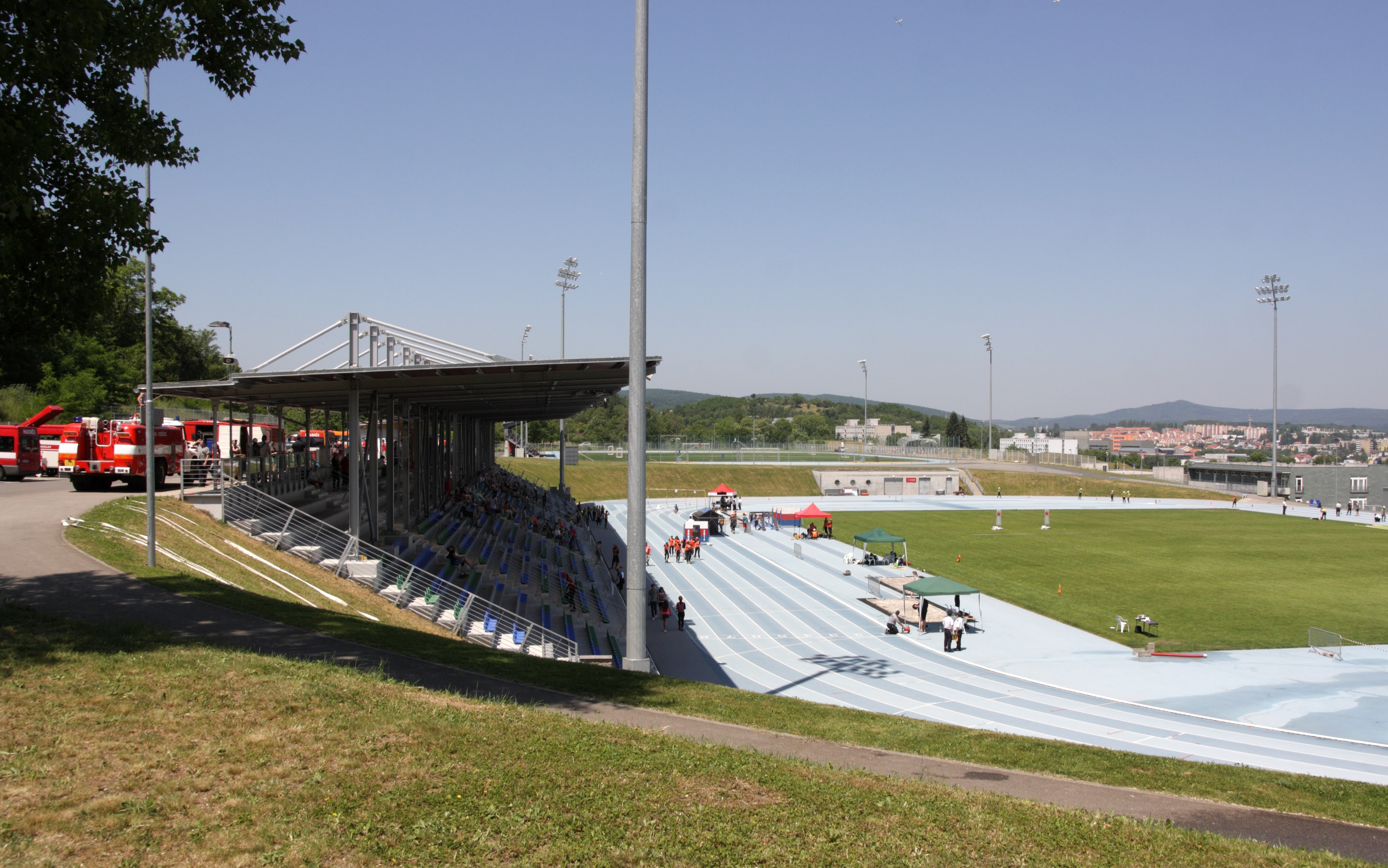 Brno - stadion Pod Palackého vrchem, hasičské závody.